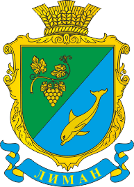 Герб села Лиман (Лиманська сільська громада)